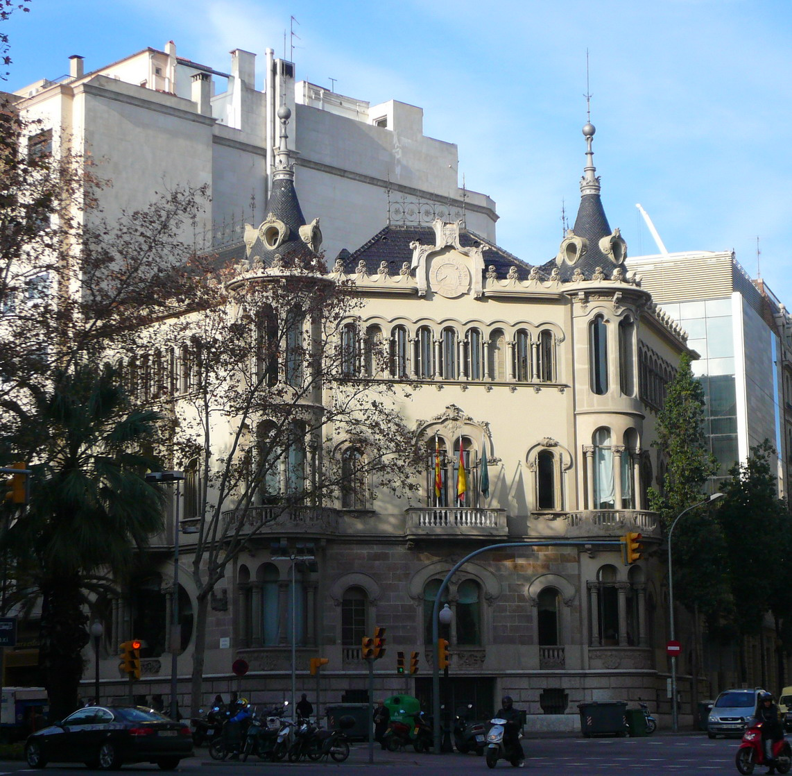 Seu del Círculo Ecuestre a Barcelona (Catalunya), obra de Joan Josep Hervás i Arizmendi, 1910